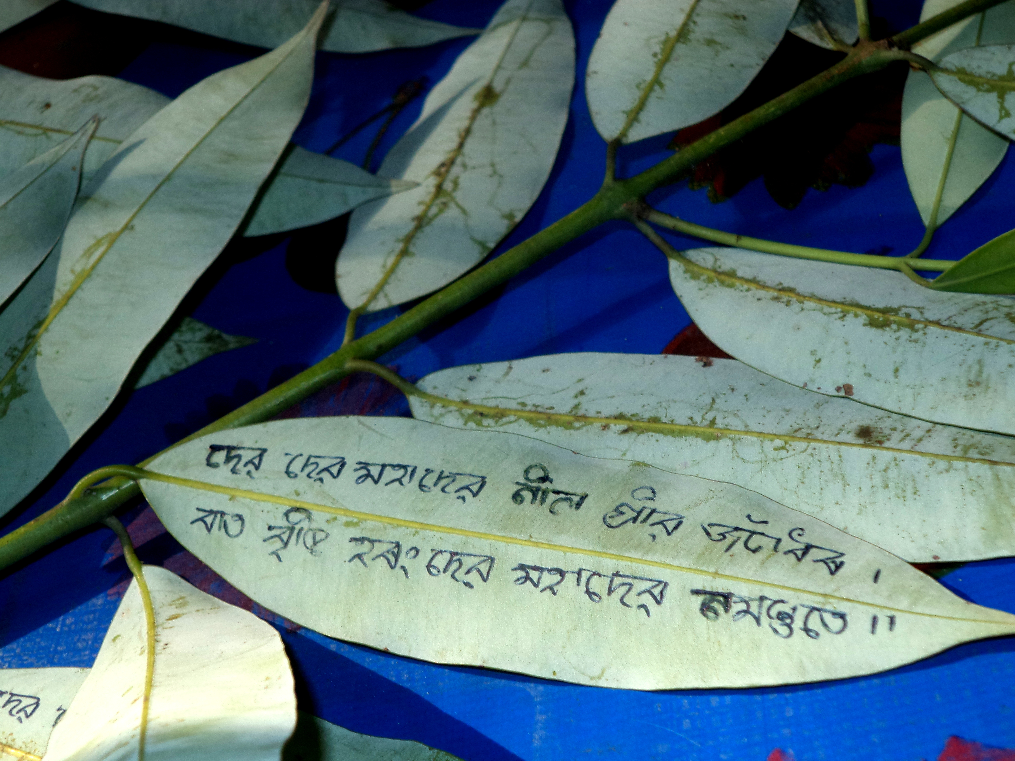 অসমীয়া: নাহৰ পাতত লিখা মন্ত্ৰ